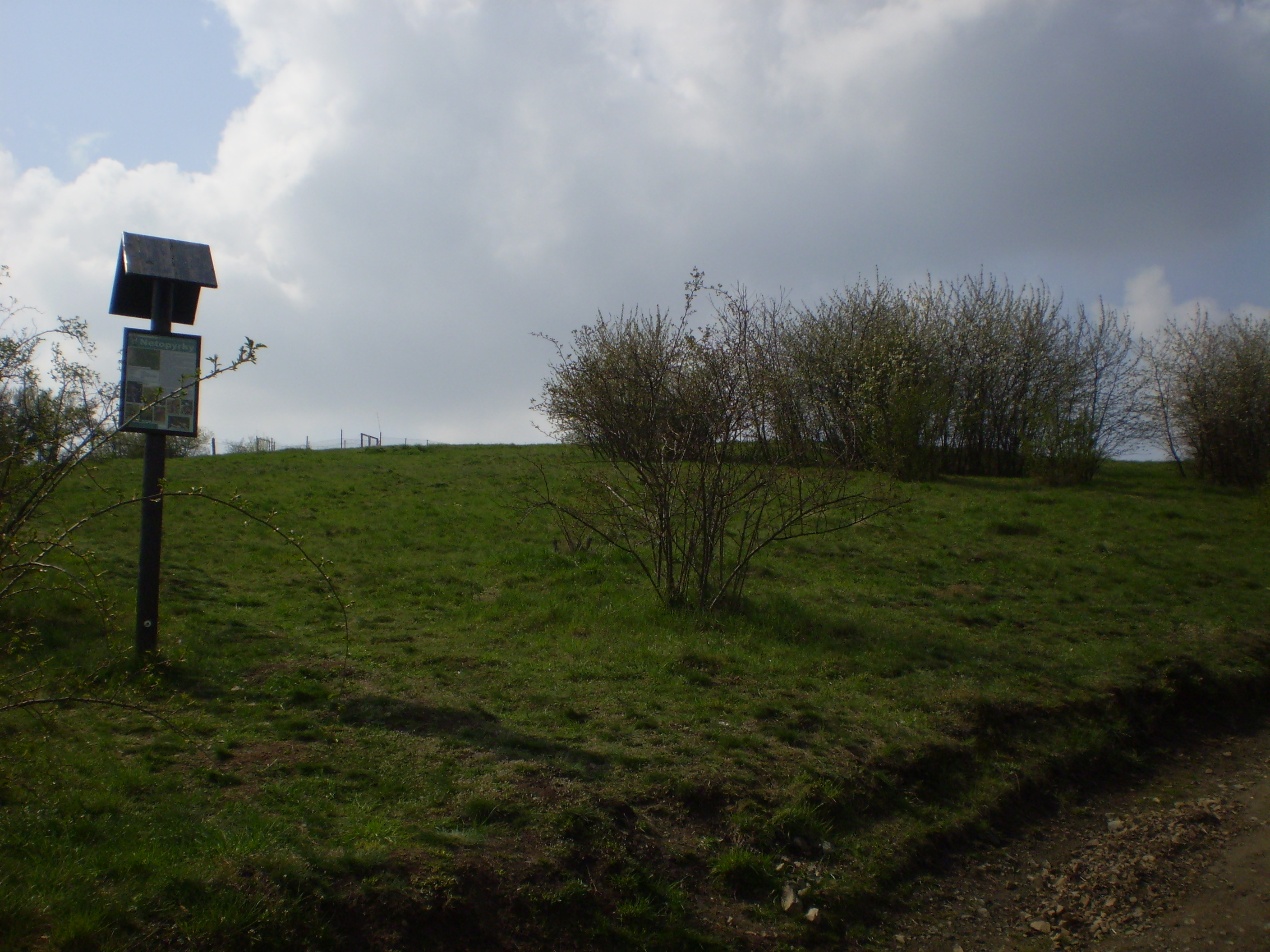 Pohled na stráň, kde se nachází chráněné území Netopárky.